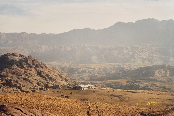 Čiampaki kalnas.